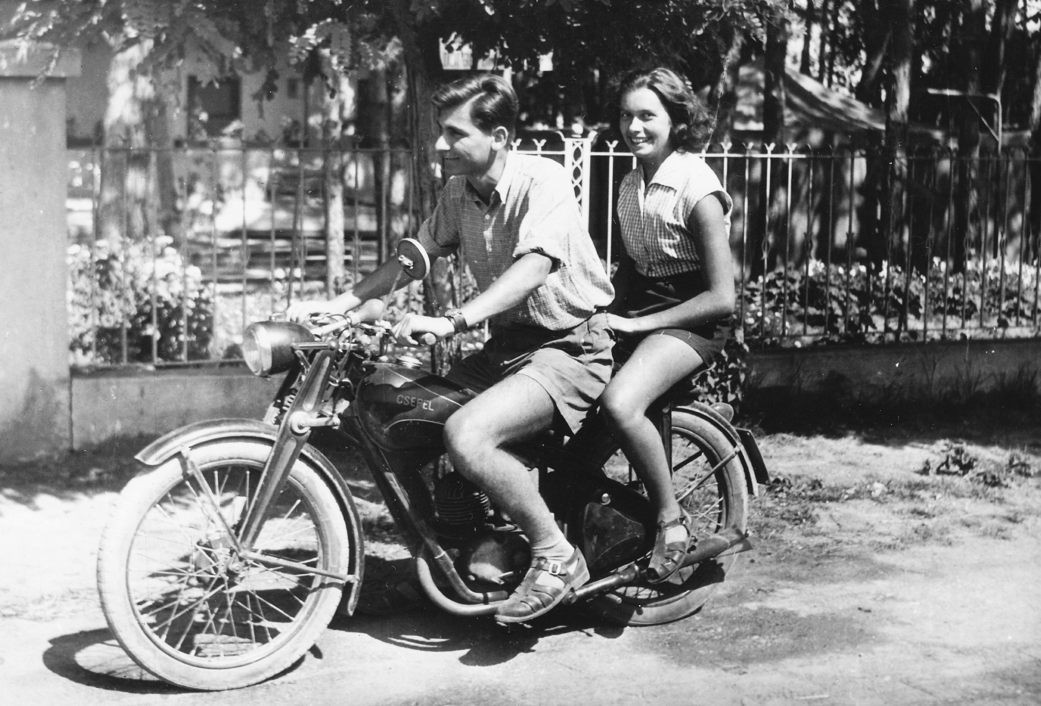 Csepel 125 motorkerékpár. Tags: Hungarian brand, motorcycle, Csepel-brand Title: Csepel 125 motorkerékpár.